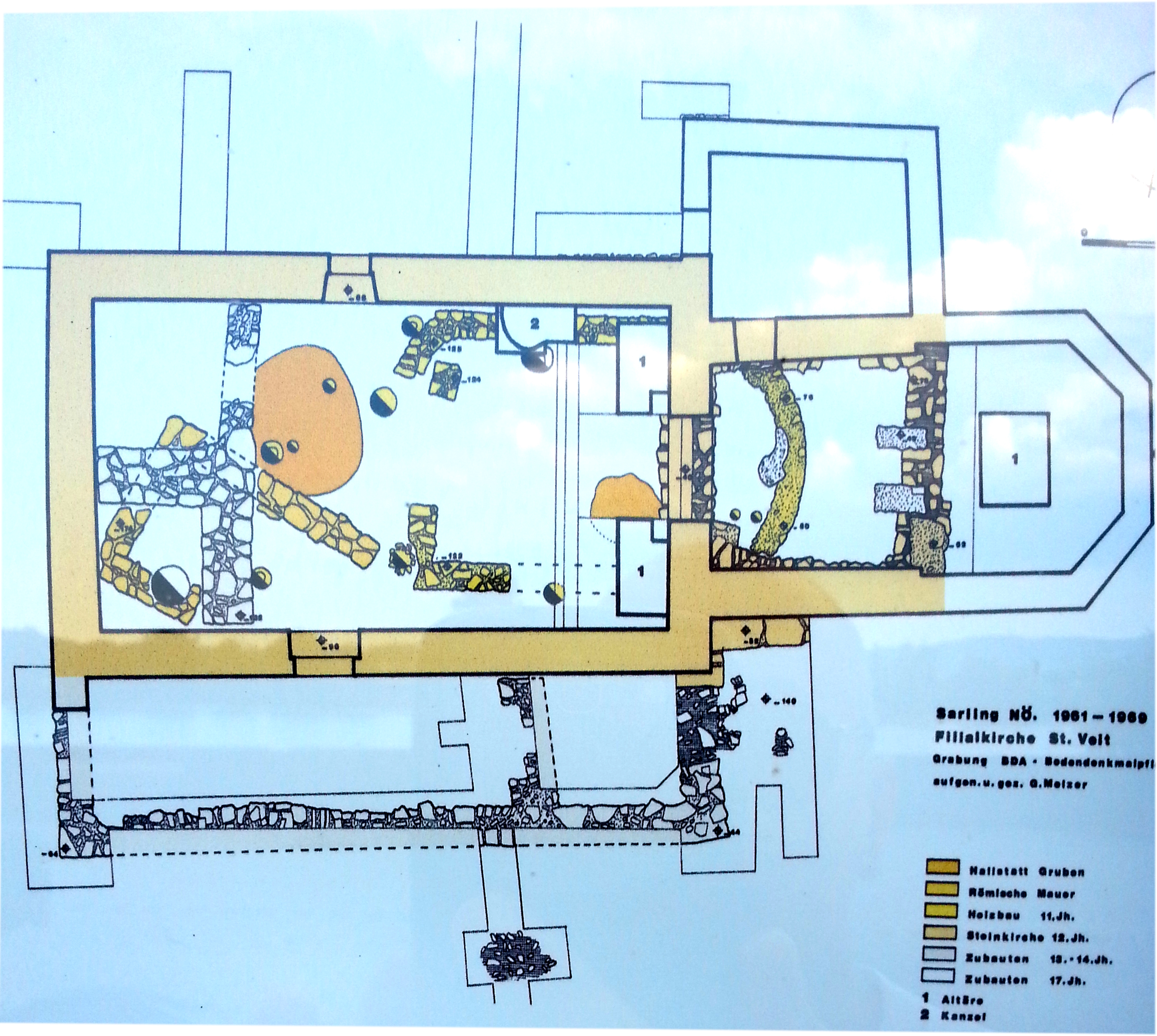 Befundplan der Ausgrabungen des Bundesdenkmalamtes in der St. Veit-Kirche von Sarling/NÖ, 1961-1969.